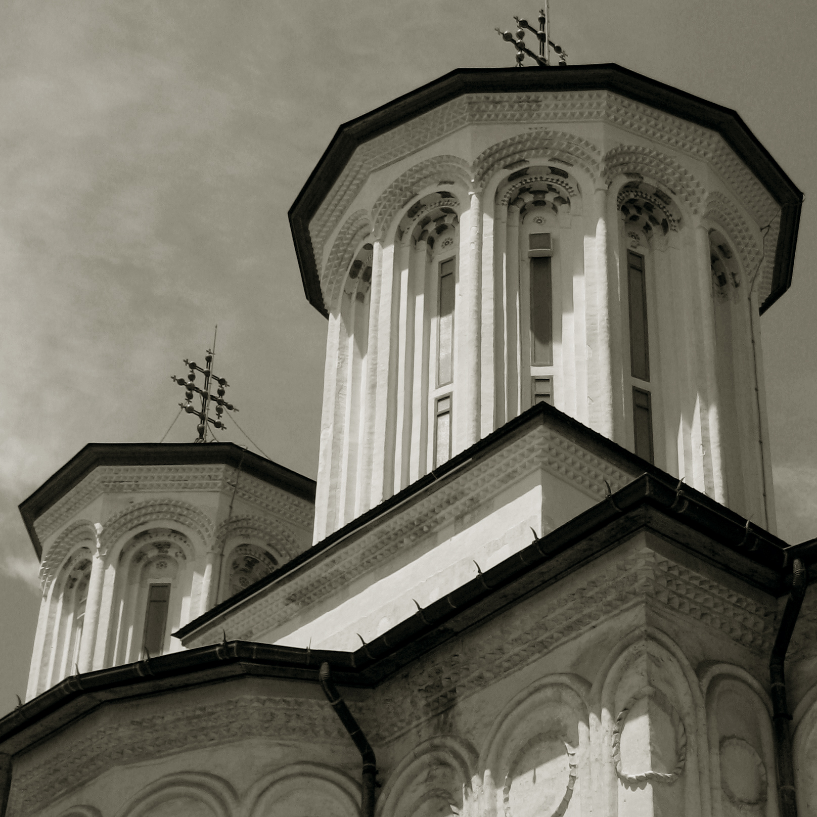 Mânăstirea Hurezi Hurezi Monastery Monastery of Horezu UNESCO World Heritage list